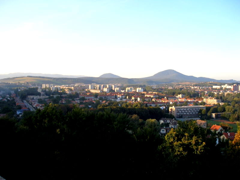 Prešov pohľad z Kalvárie